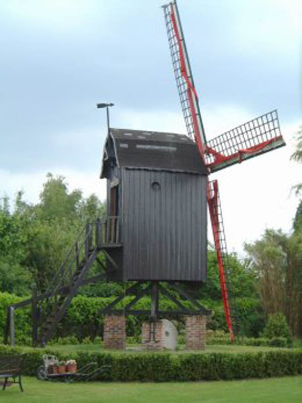 torhoutsestraat 185